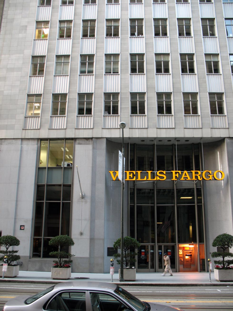 Wellsfargohq